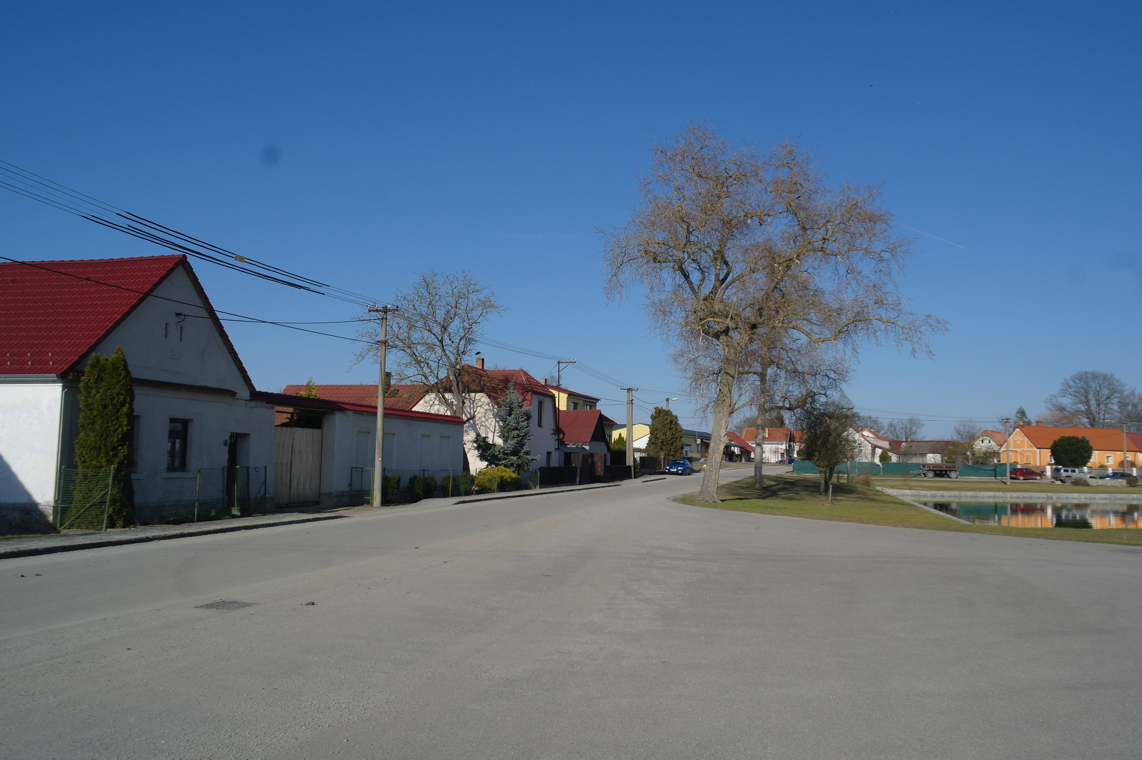 Smržov, náves s rybníkem